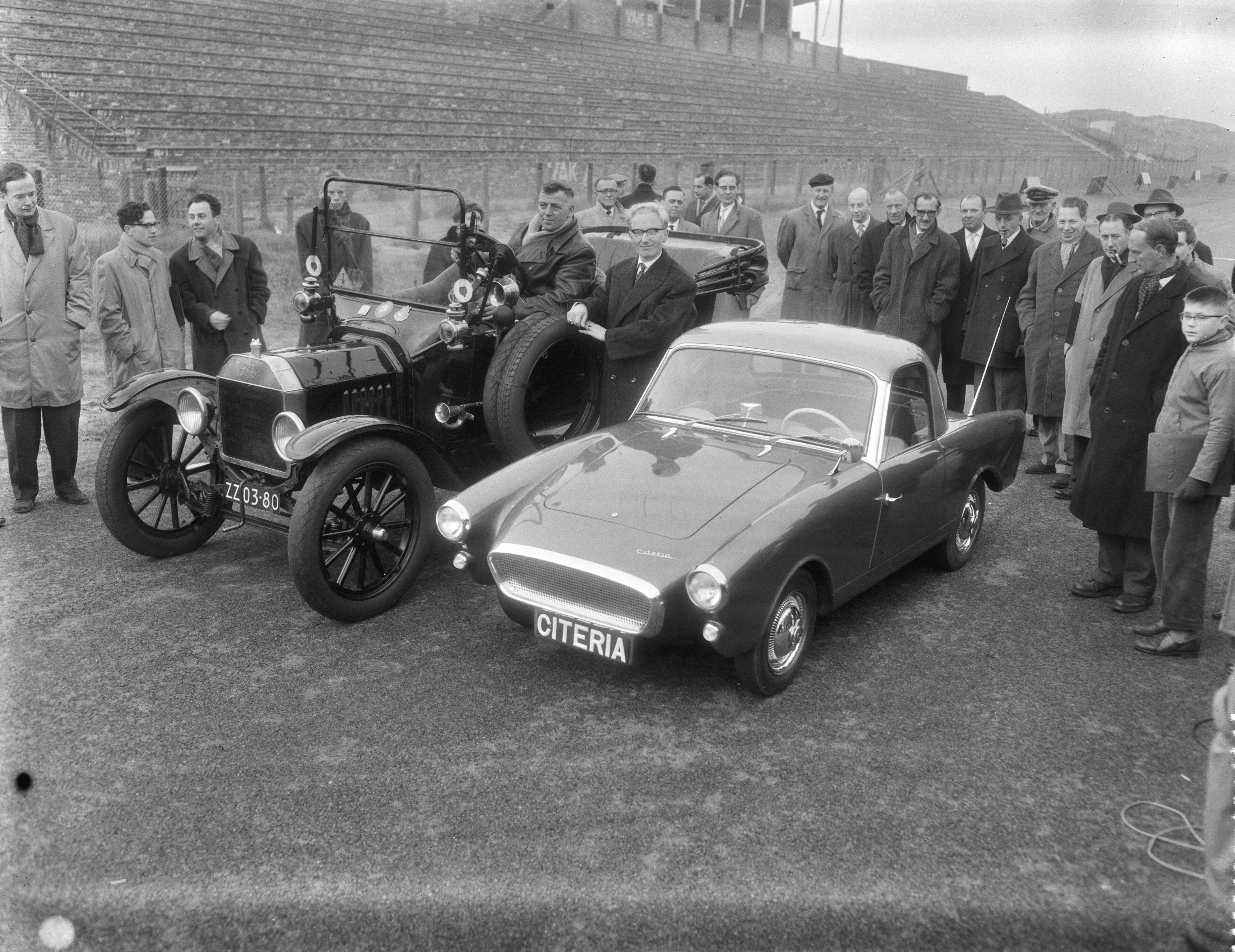 Collectie / Archief : Fotocollectie Anefo Reportage / Serie : [ onbekend ] Beschrijving : Demonstratie van een nieuwe Nederlandse sportwagen Citer op het circuit van Zandvoort , Citeria met een fordje ui 1900, in het midden de ontwerper Van Beckum Datum : 17 november 1958 Trefwoorden : demonstraties, ontwerpers Fotograaf : Pot, Harry / Anefo Auteursrechthebbende : Nationaal Archief Materiaalsoort : Negatief (zwart/wit) Nummer archiefinventaris : bekijk toegang 2.24.01.04 Bestanddeelnummer : 909-9789